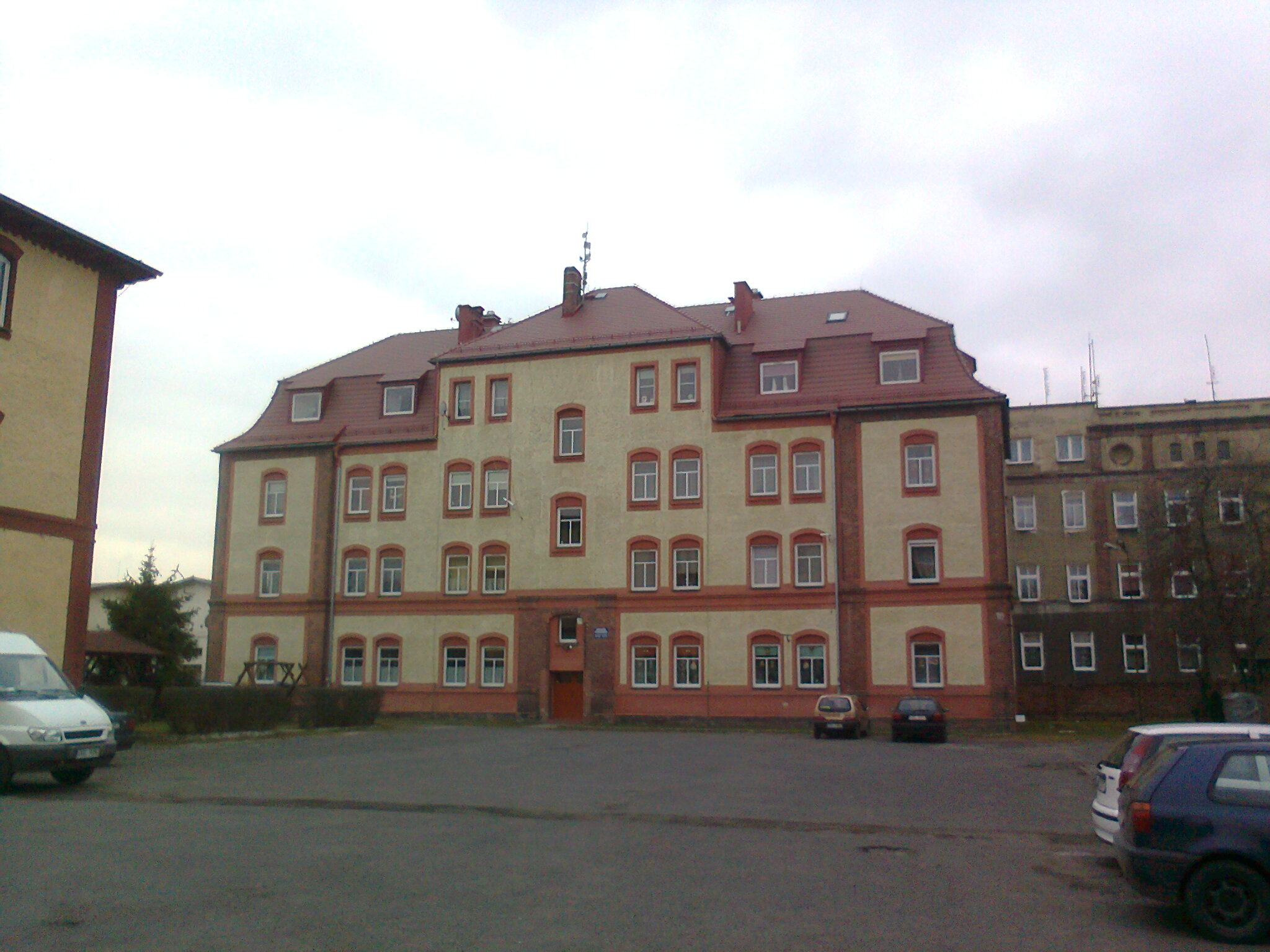 Głubczyce, byłe koszary w Głubczycach — widok od strony dawnego placu apelowego